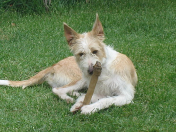 Esta fotografia foi tirada ao meu cão, há cerca de 1 ano, no jardim de minha casa.